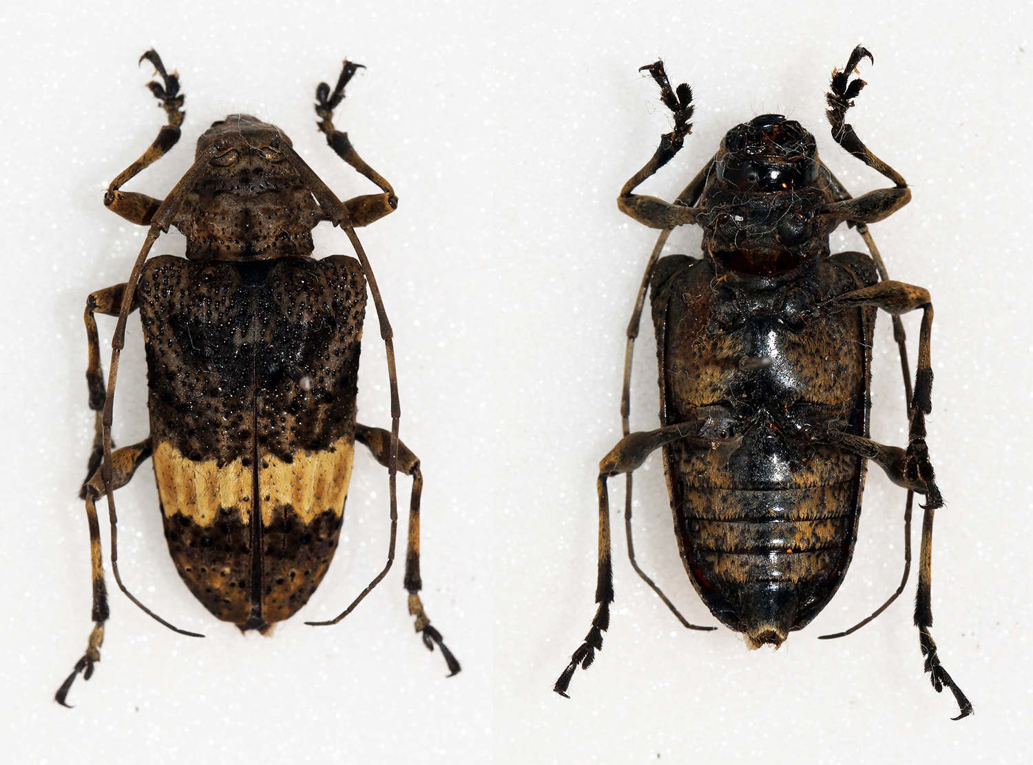 Hovore,1998 Sex: Male Data: 06-2005 - Costa Rica Size: 21mm